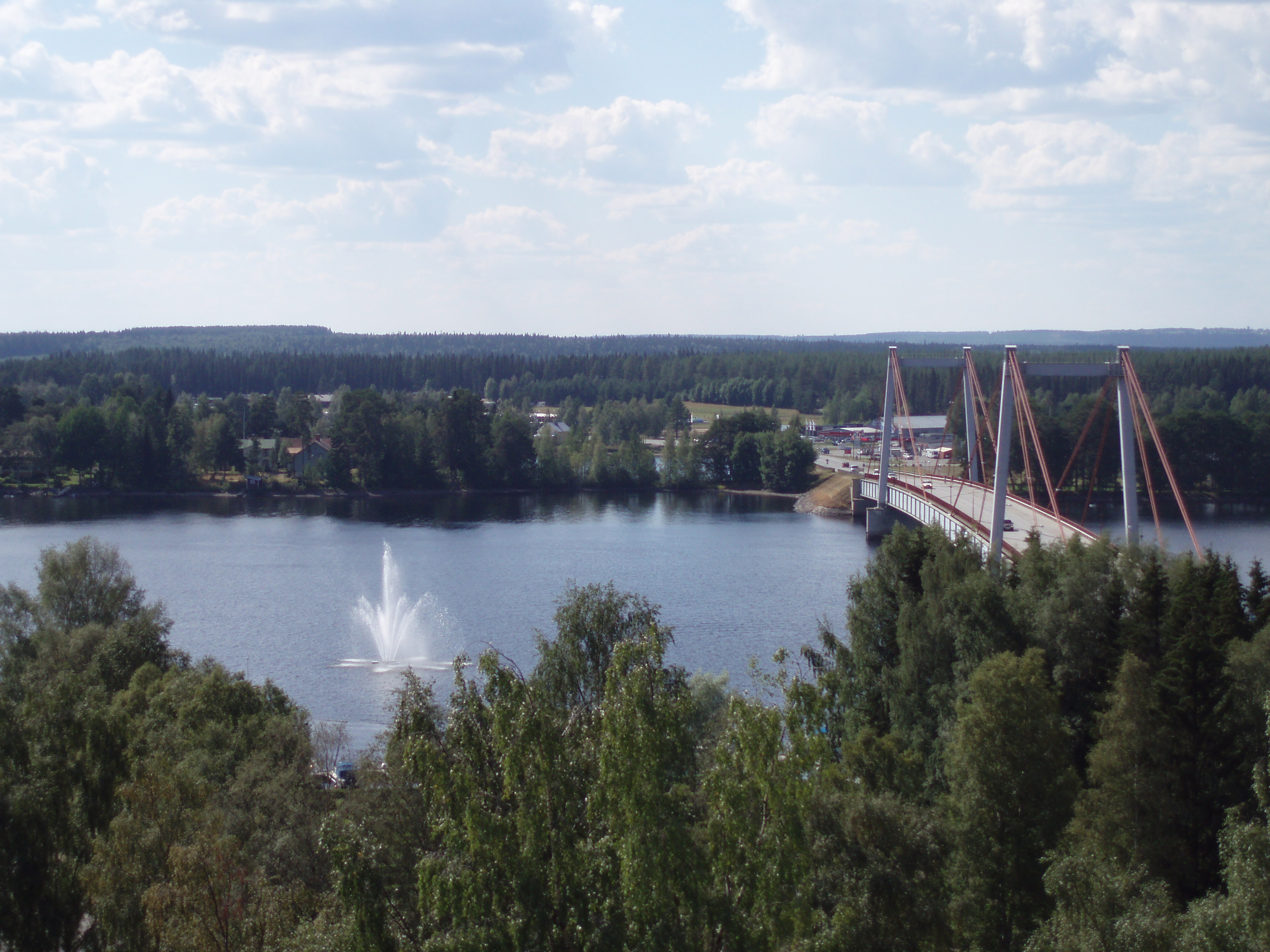 Ströms Vattudal and Strömsund bridge, Strömsund, Sweden. Photo taken in aug. 2006 by me - User:Cucumber